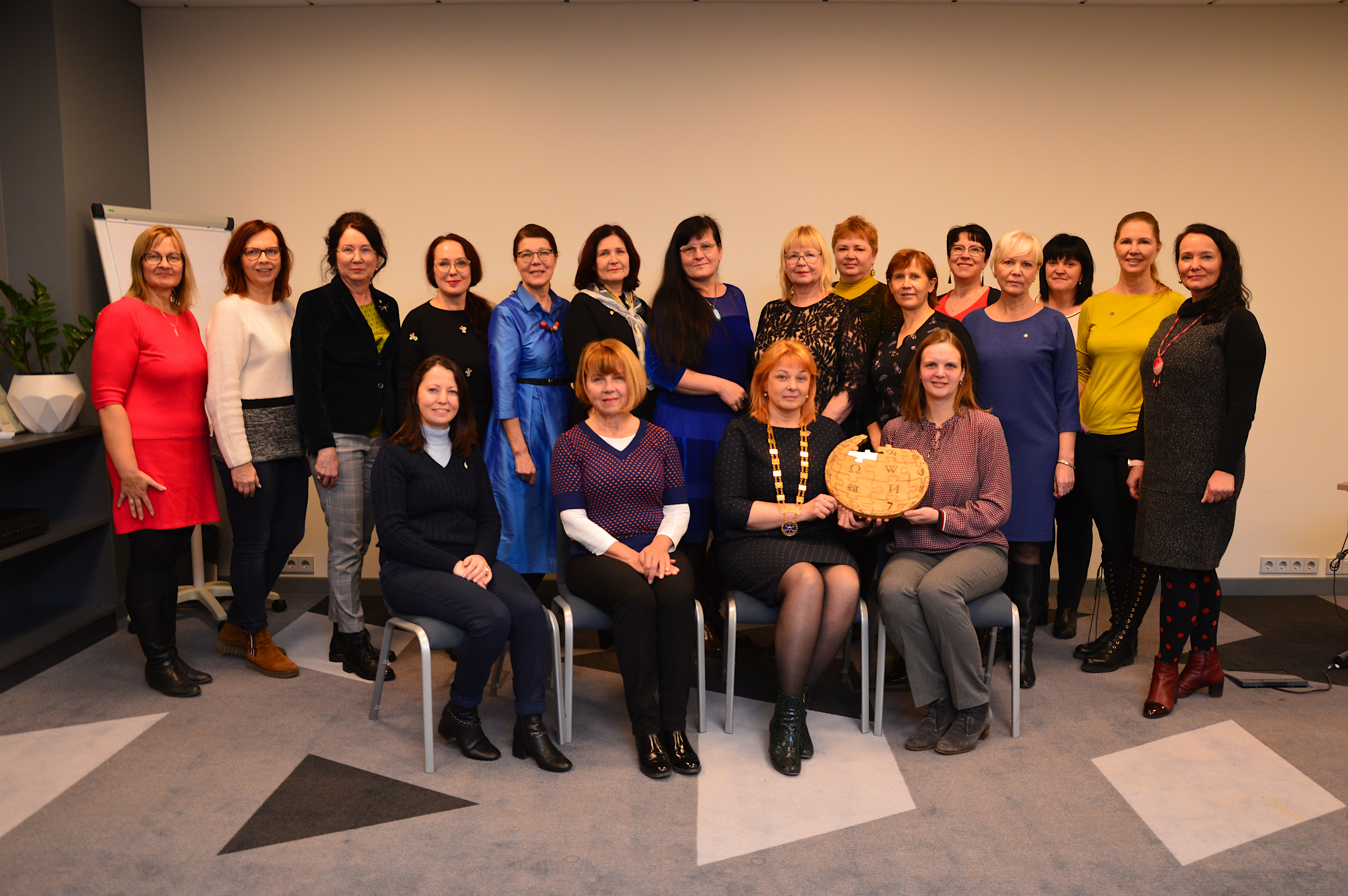 Tartu Hansa Rotary Klubi Vikipeedia sõbra auhinna üleandmisel 3. veebruaril 2020. Auhinda hoiavad klubi president Aive Kalinina (vasakul) ja Wikimedia Eesti esindaja Ann Siiman (paremal).